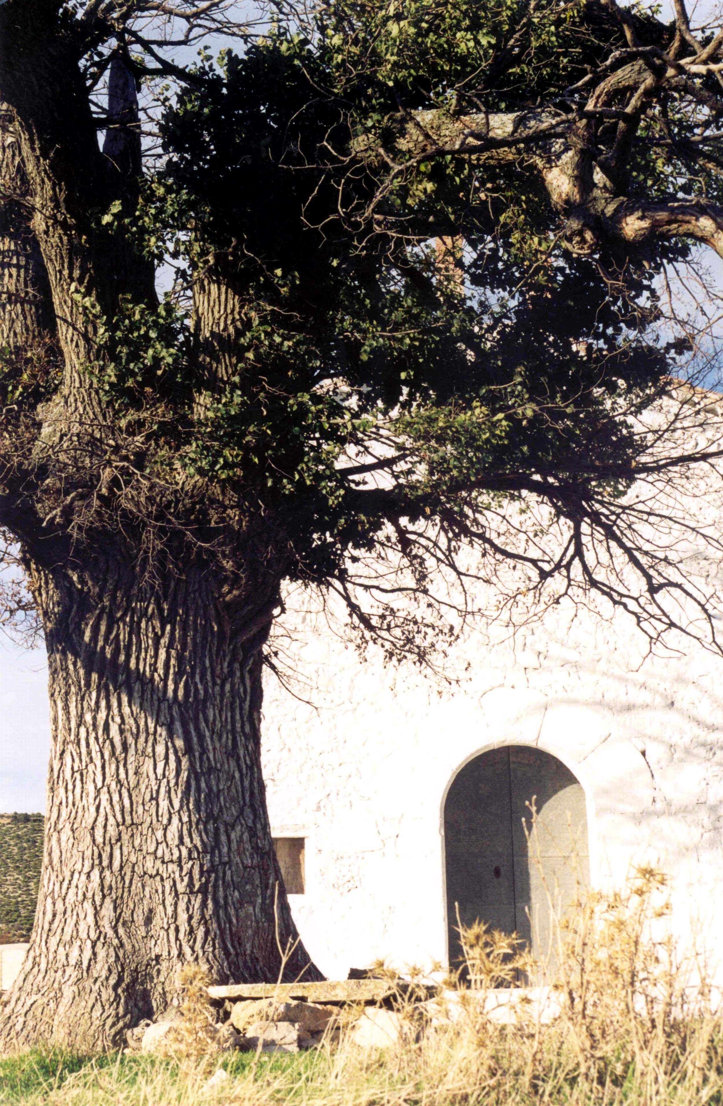 Vista de la entrada a la ermita de San Roque, Vallanca (Valencia), con detalle del antiguo olmo que la sombreaba.